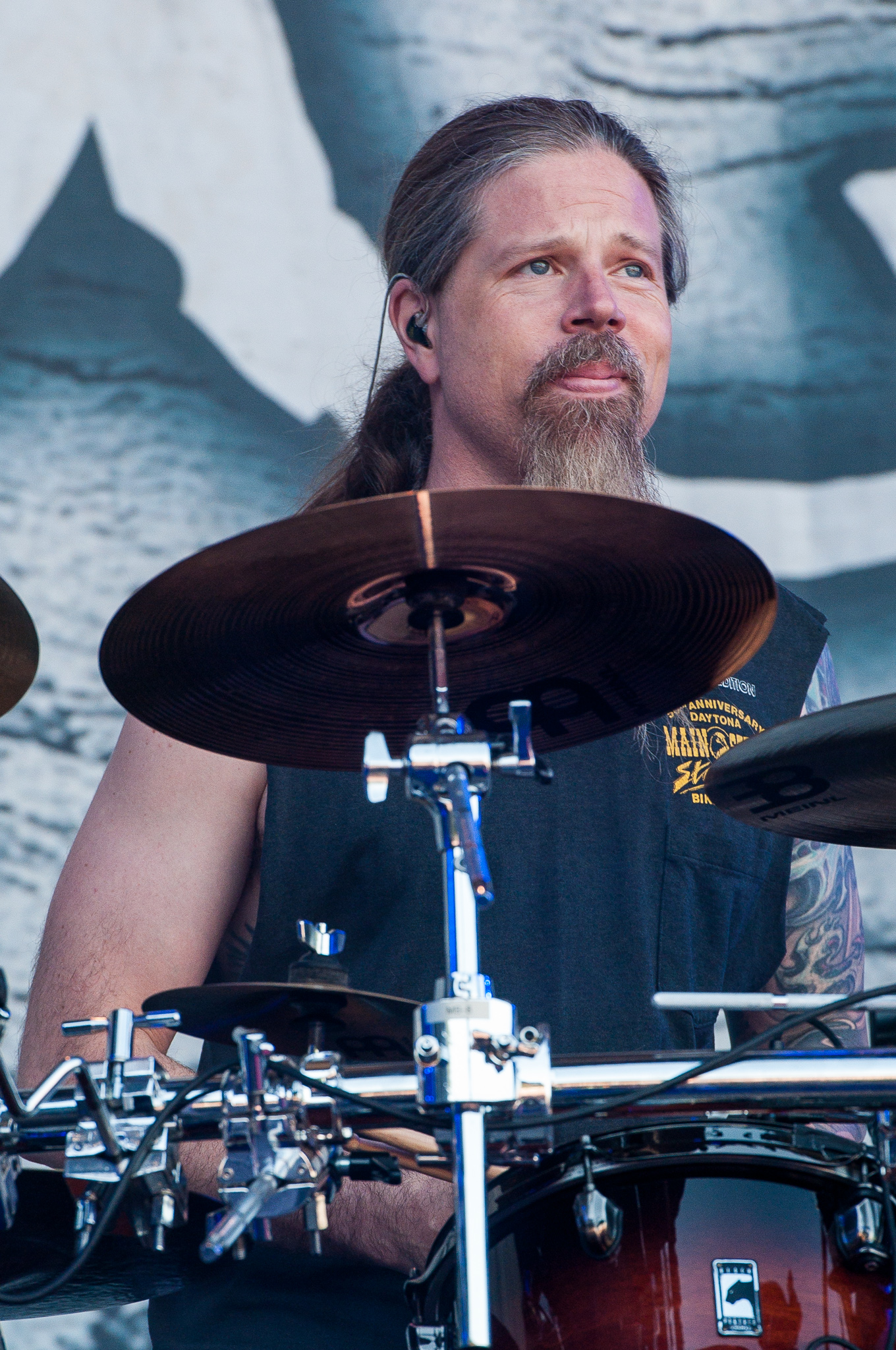 ARGO-Konzerte,Beck's Park Stage,Chris Adler,Festival,Konzert,Lamb of God,Livekonzert,Livemusik,Musik,RiP,Rock im Park 2015